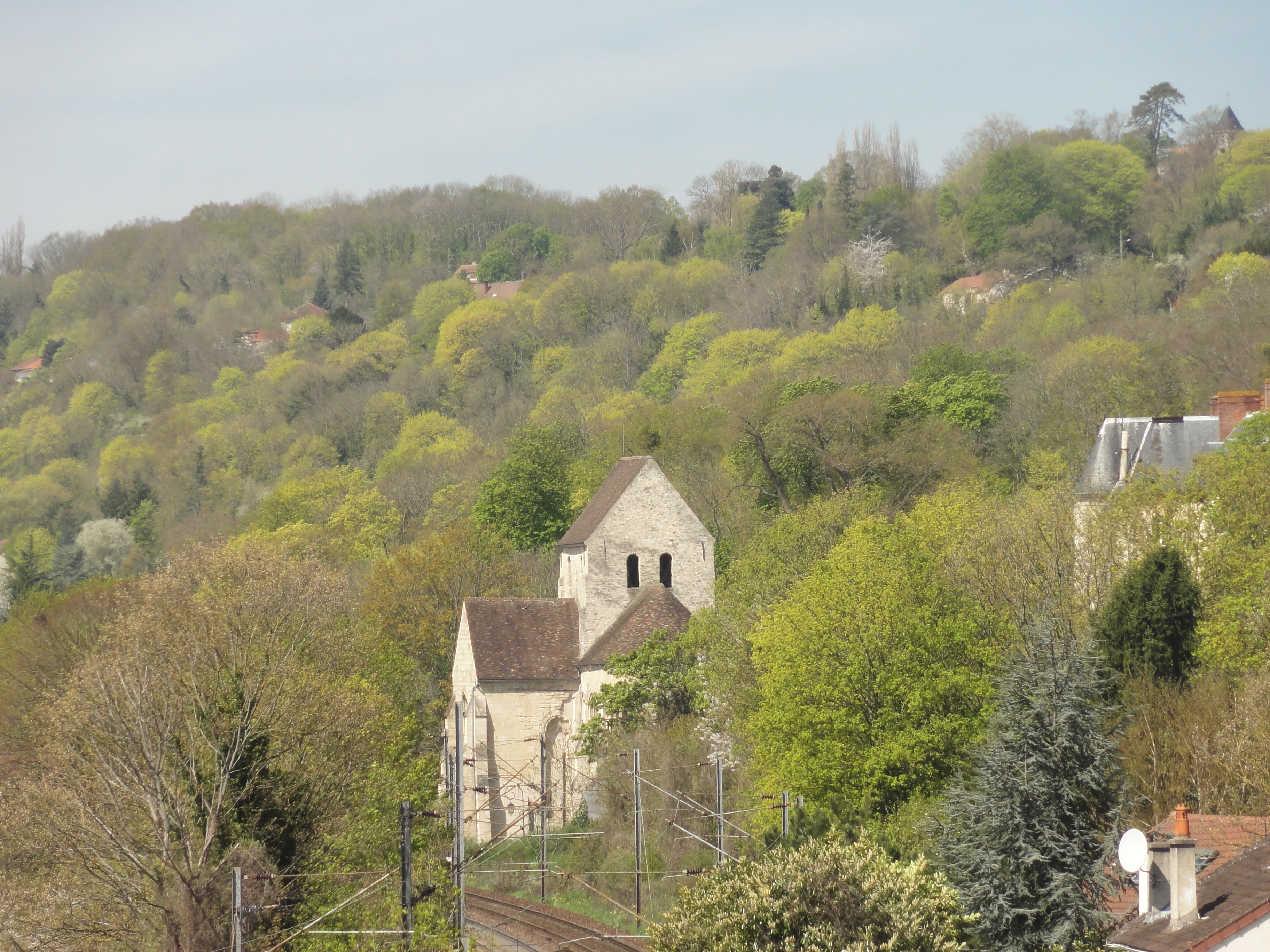 Approche par l'est, vue depuis la RD 17.